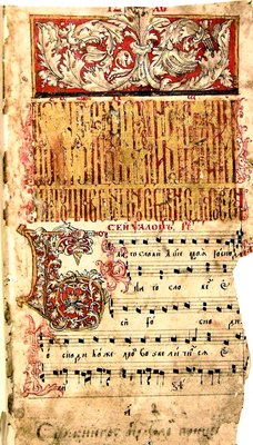 Всенощное бдение. Лист из Жировицкого Ирмологиона. 20-е гг. XVII в. (ИР НБУВ. Ф. 1. № 3367. Л. 2)